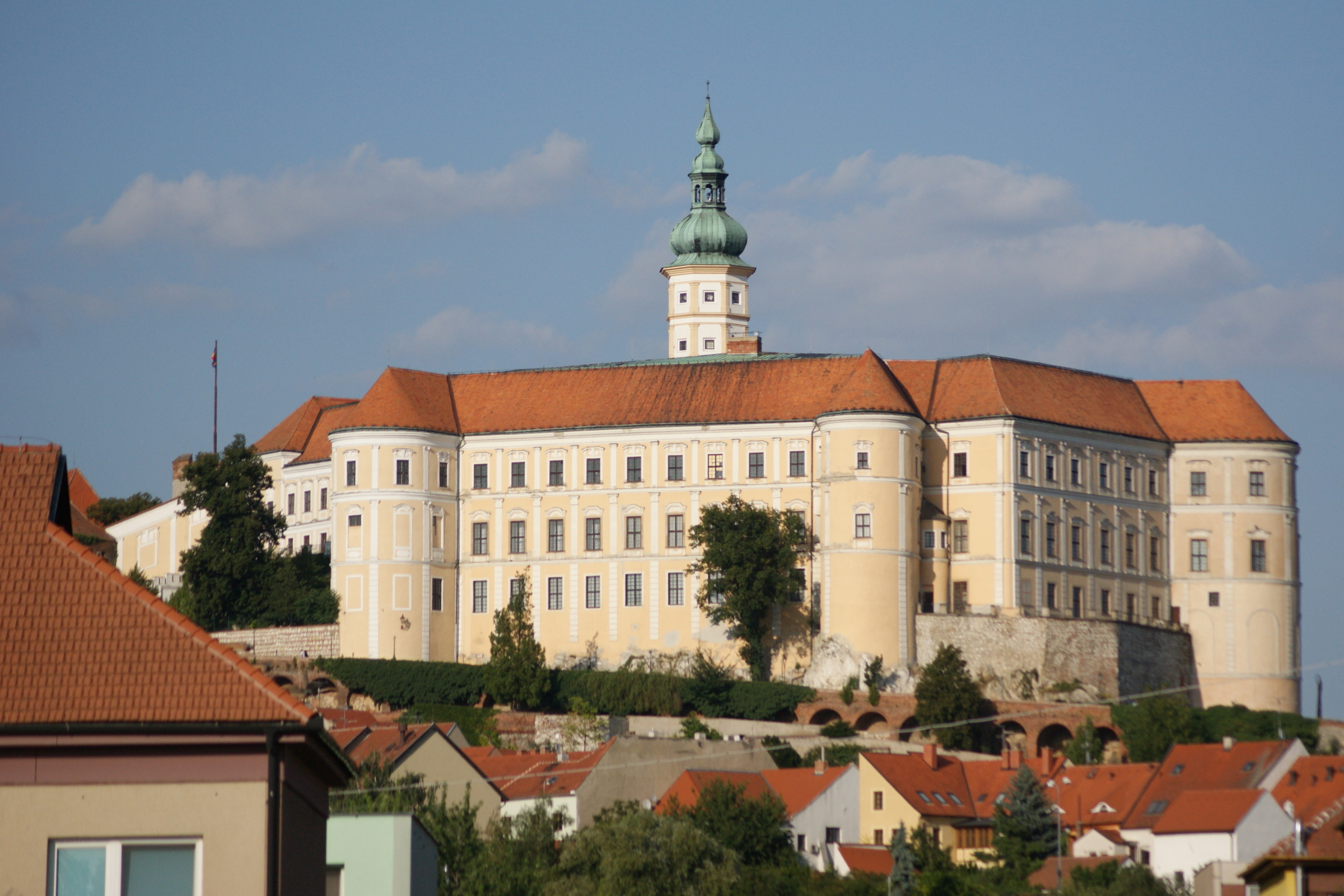 Zámek Mikulov, Zámek 1/4, Mikulov.